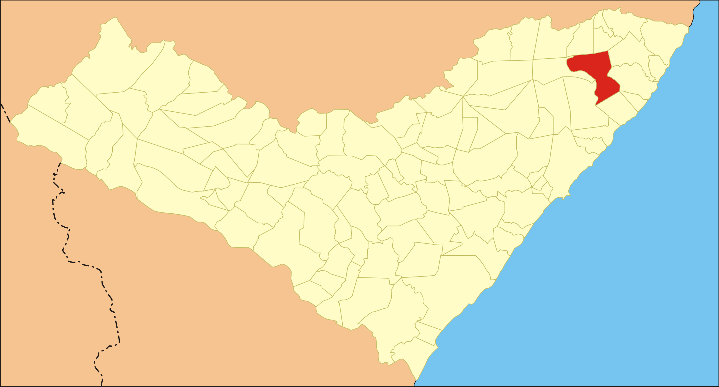 Localização da cidade no estado de Alagoas.